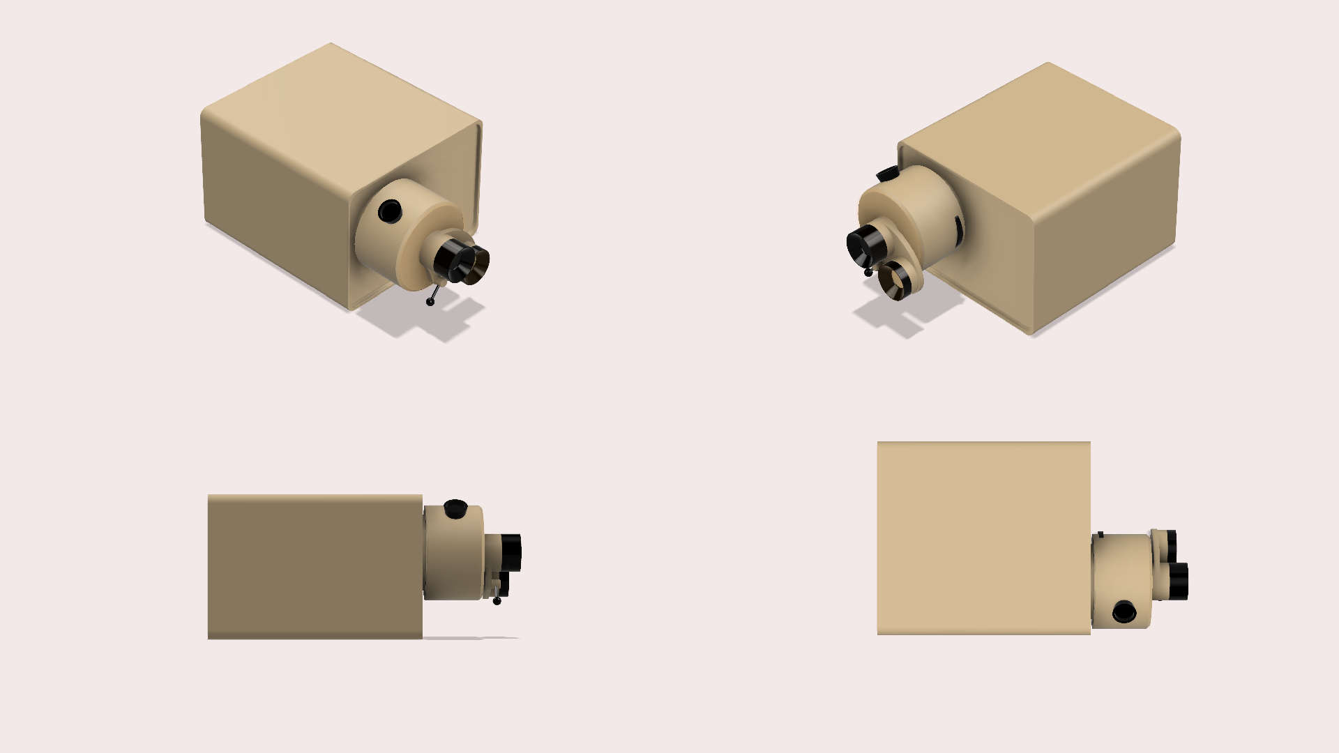 Dies ist eine Vier-Seiten-Ansicht des Tritest L3 Testgeräts von Luneau France. Es wurde basierend auf Fotoaufnahmen mit dem Programm Autodesk Fusion 360 erstellt. Dieses Testgerät wird auch in Köln beim Deutschen Zentrum für Luft- und Raumfahrt beim Lanterntest eingesetzt.